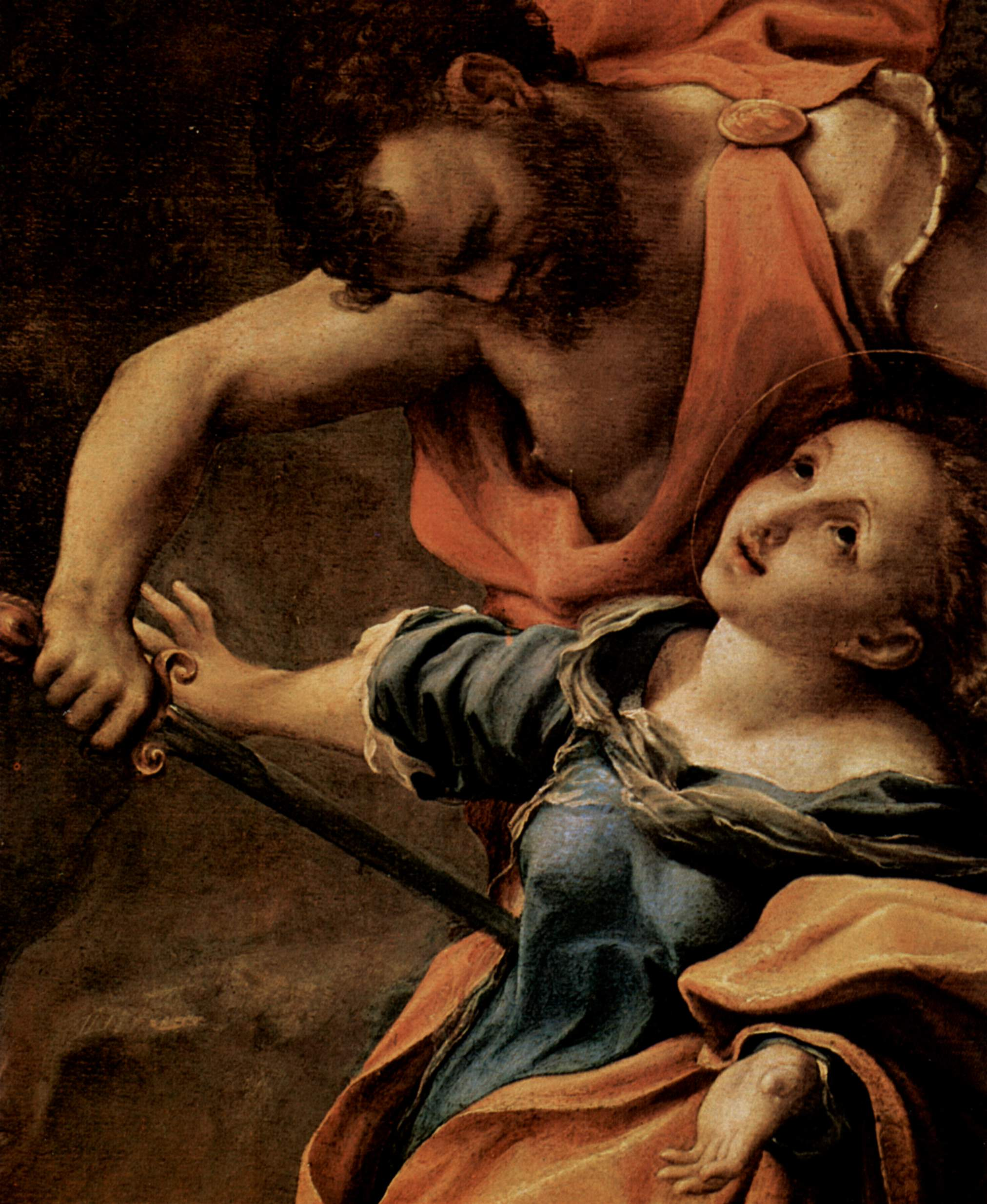 detail